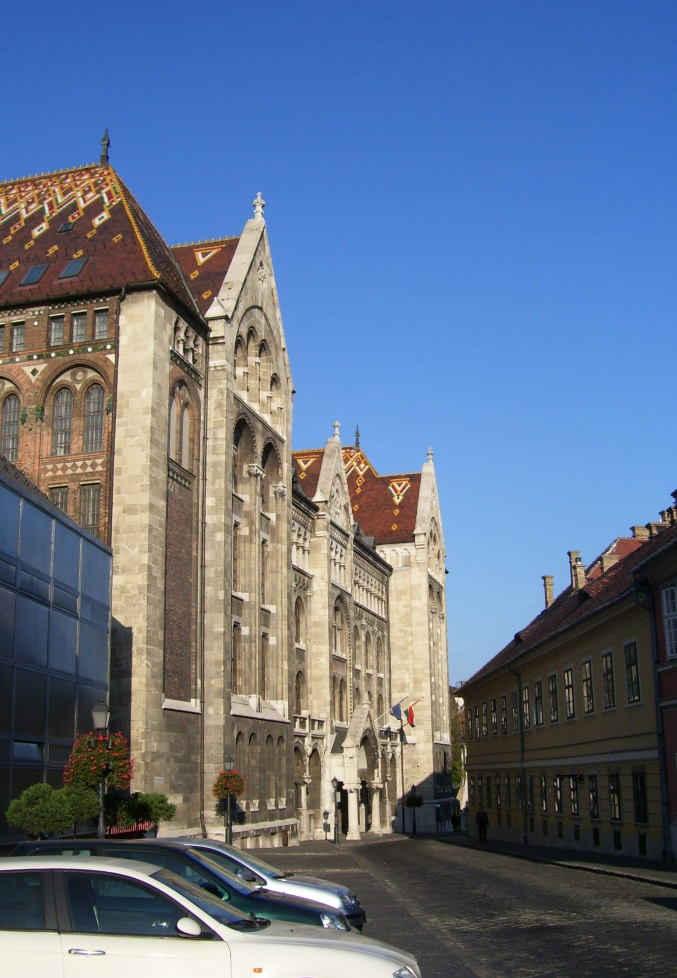 Magyar Országos Levéltár. Kapisztrán tér